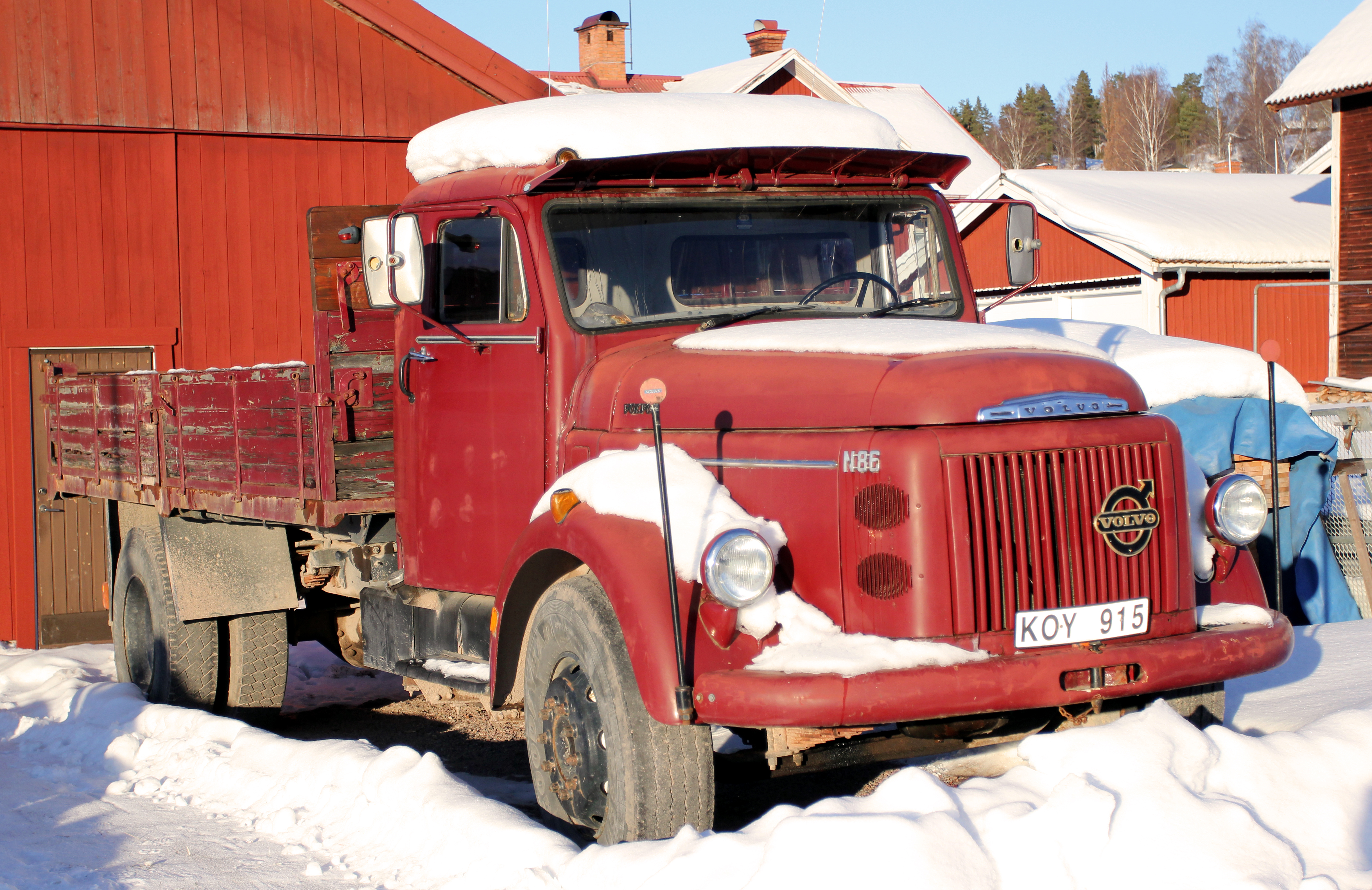 Volvo N86 i Tibble, Leksands kommun, Sverige.